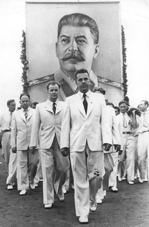 Budapest, II. Weltfestspiele, Festumzug, Komsomolzen Weltjugendfestspiele in Budapest.UBz:Komsomolzen unter Führung von N.Mikhailov (rus: Н. А. Михайлов), Sekretär des Zentral-Komitees des Komsomolzenverbandes. Aufn:Illus 24.8.1949